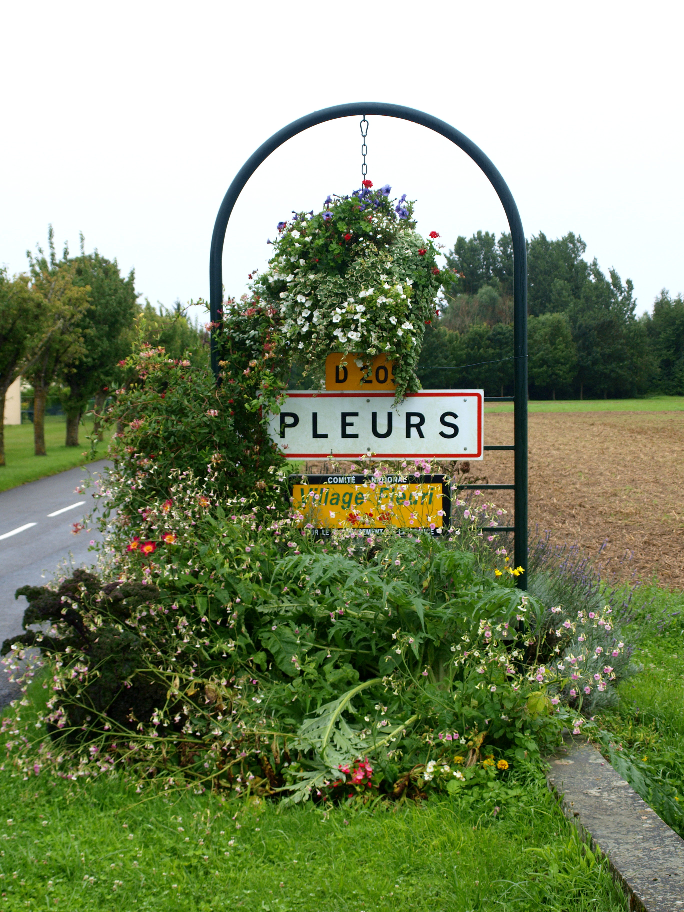 Pleurs (Marne, France) ; panneau d'agglomération